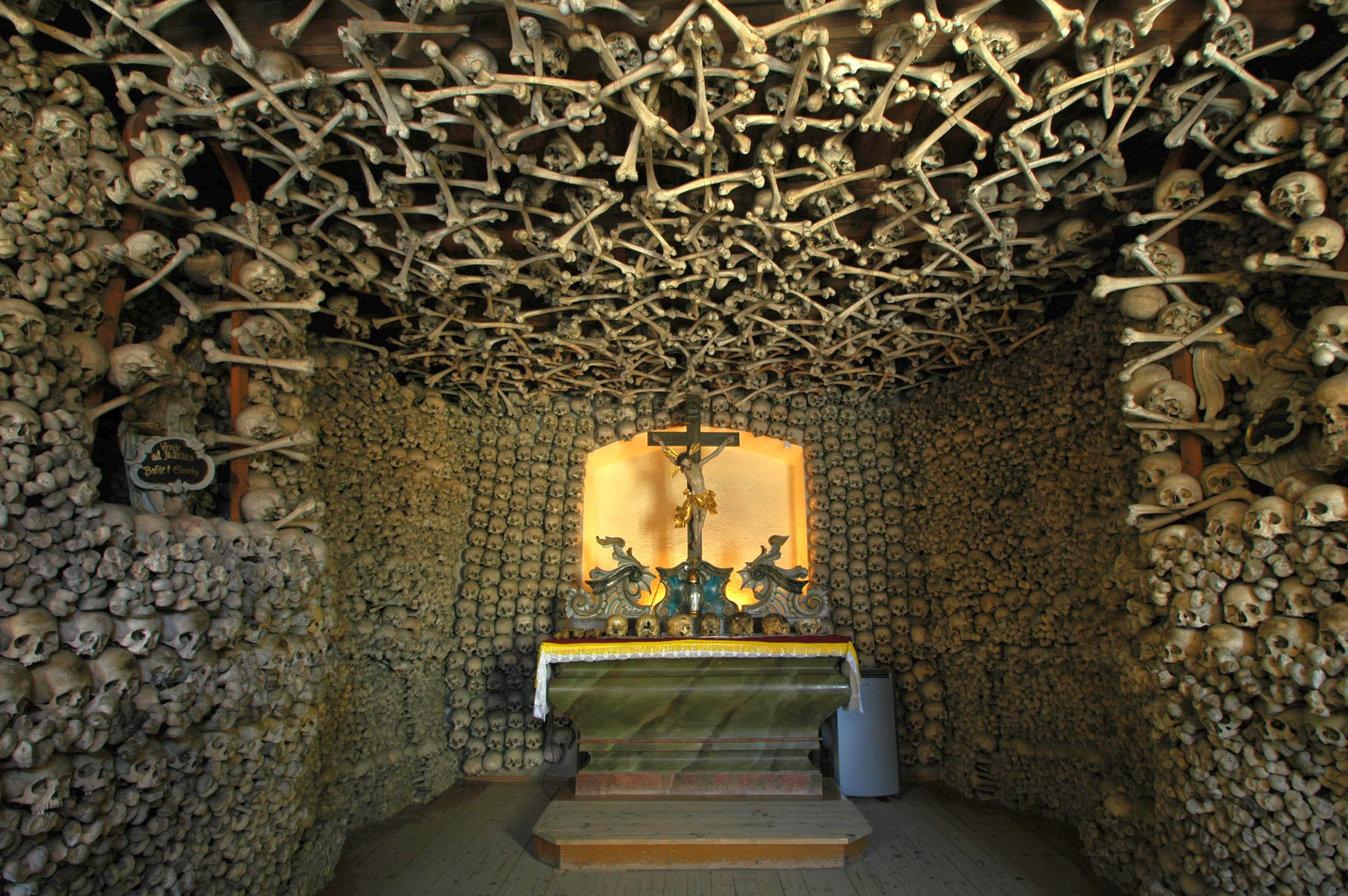 Chapel of Skulls in Czermna, Poland. Kaplica Czaszek w Czermnej. interior